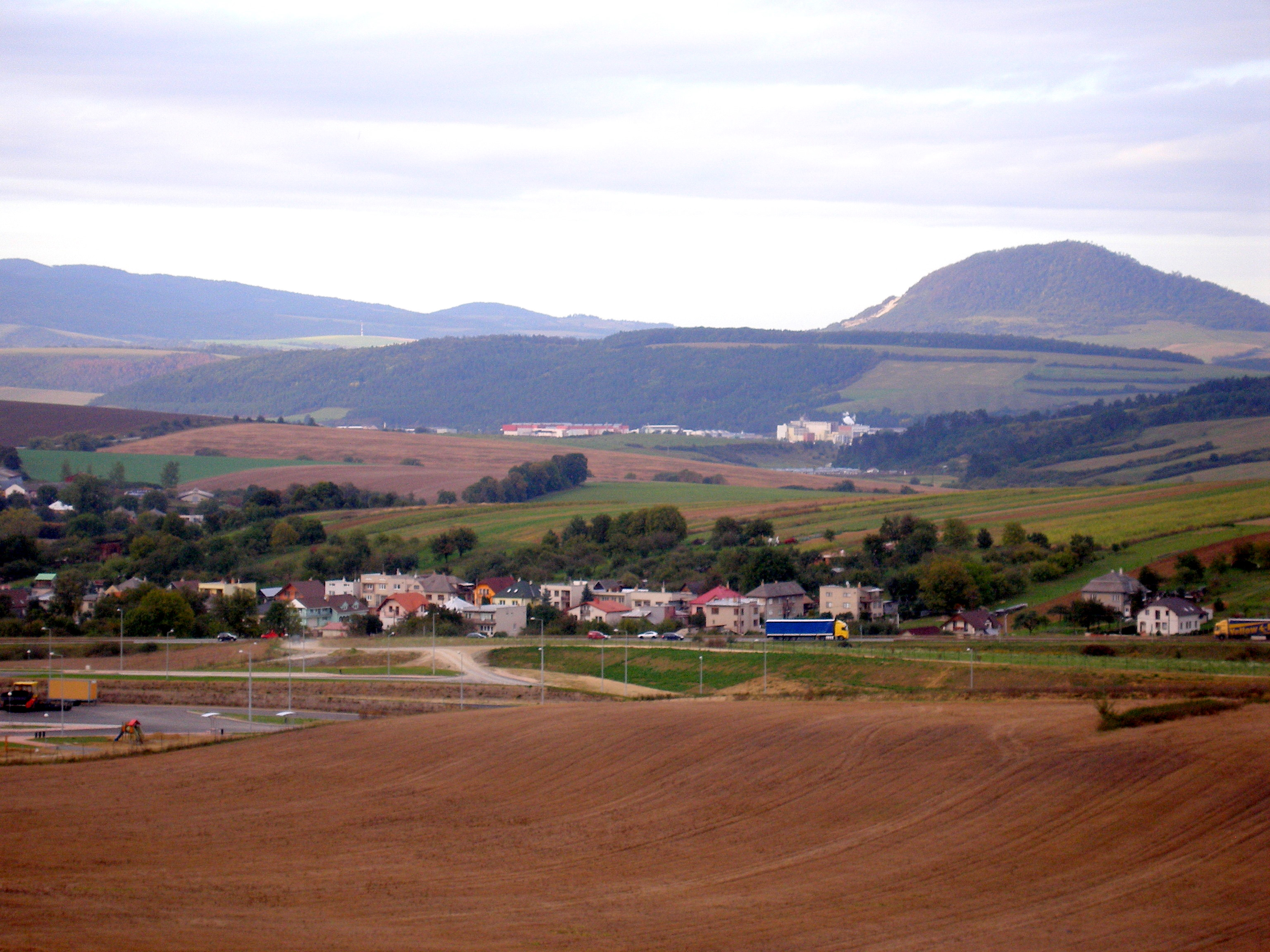 Malý Šariš. Výstavba diaľnice.